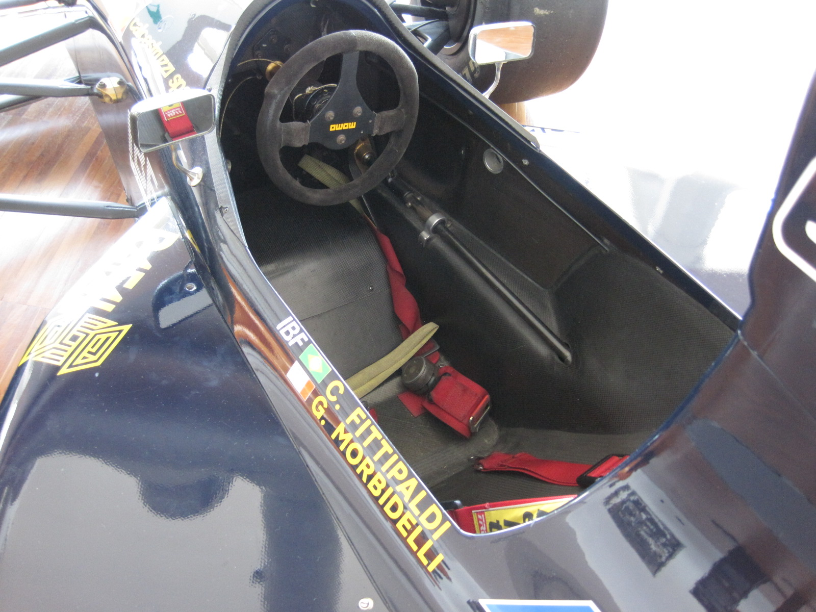 Musée Lamborghini - Minardi F1 M. 191/L - 03 - Saison 1992